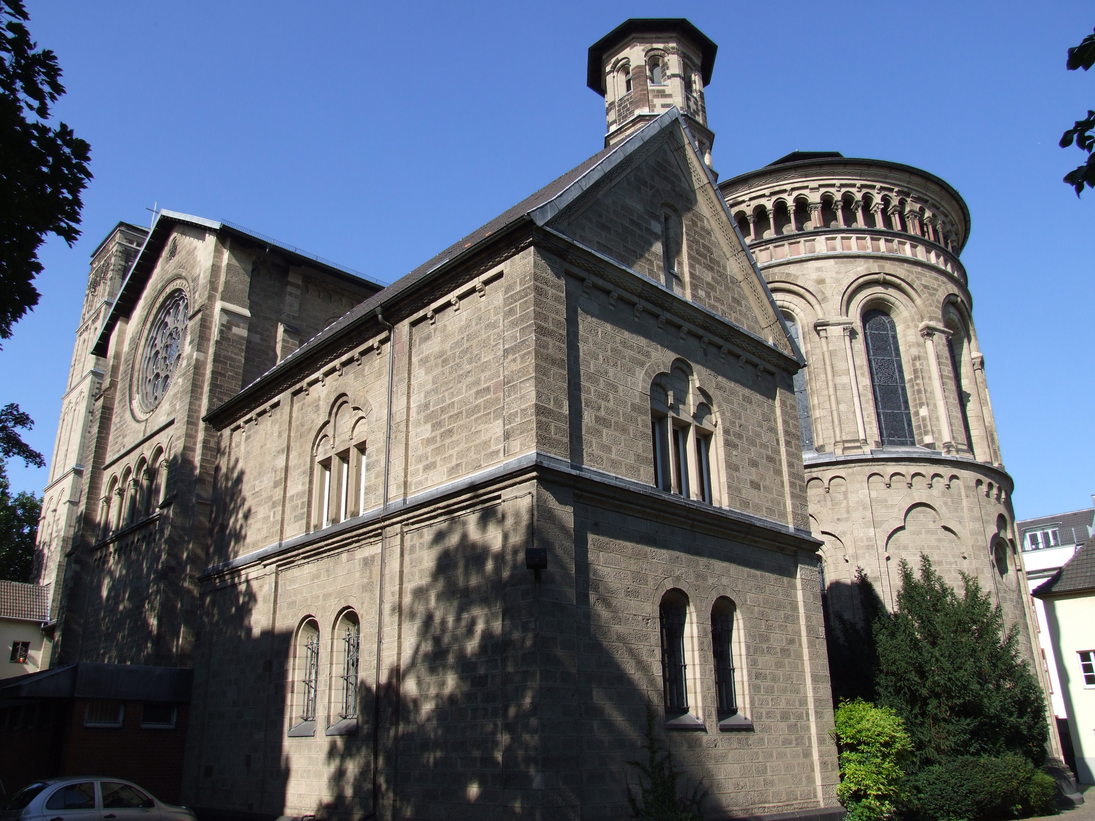 Neu St. Heribert